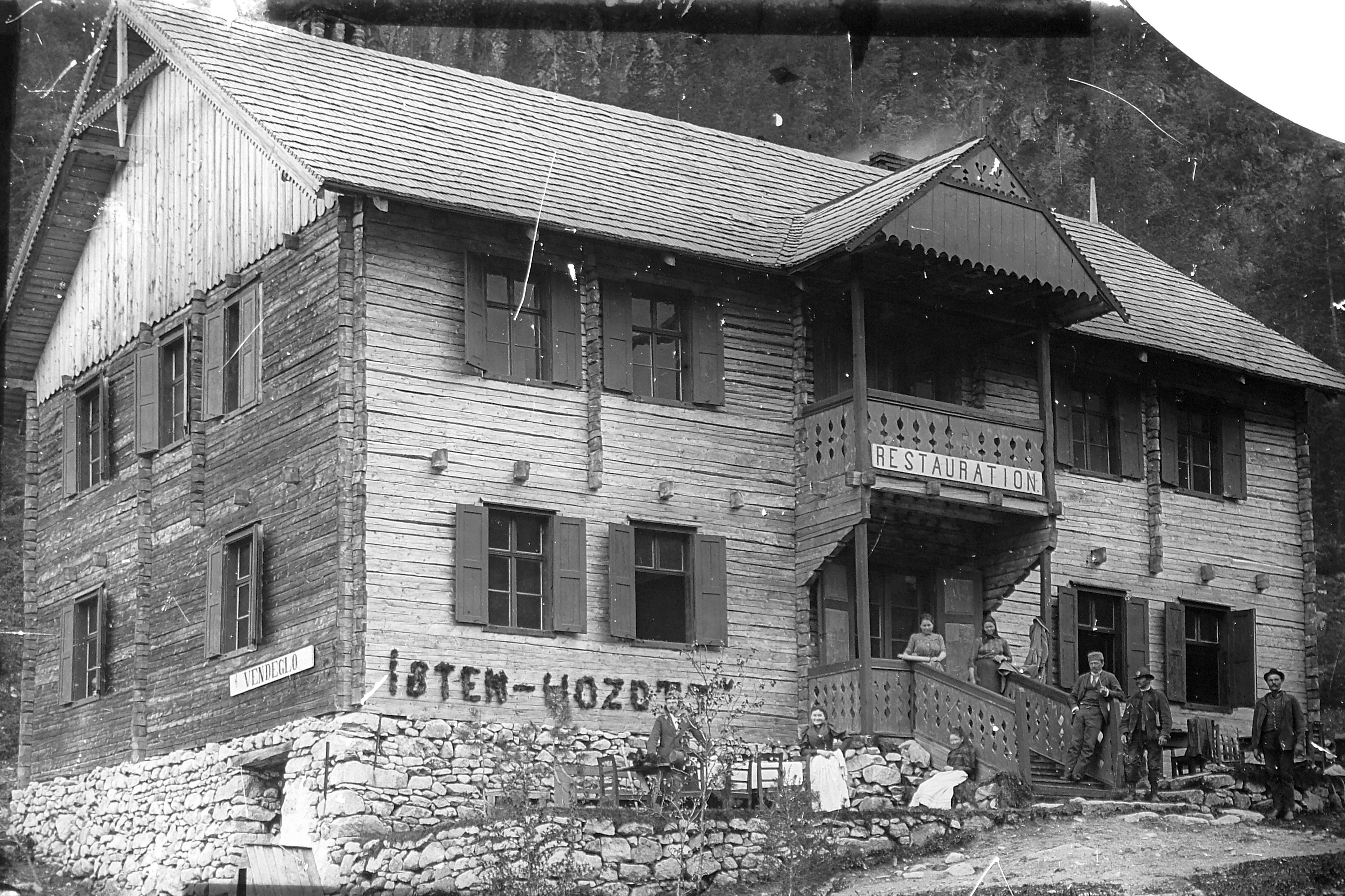 Nagy-Tarpataki-völgy, Zerge szálló. Location: Slovakia, High Tatras Tags: hotel, Tatra Mountains Title: Nagy-Tarpataki-völgy, Zerge szálló.